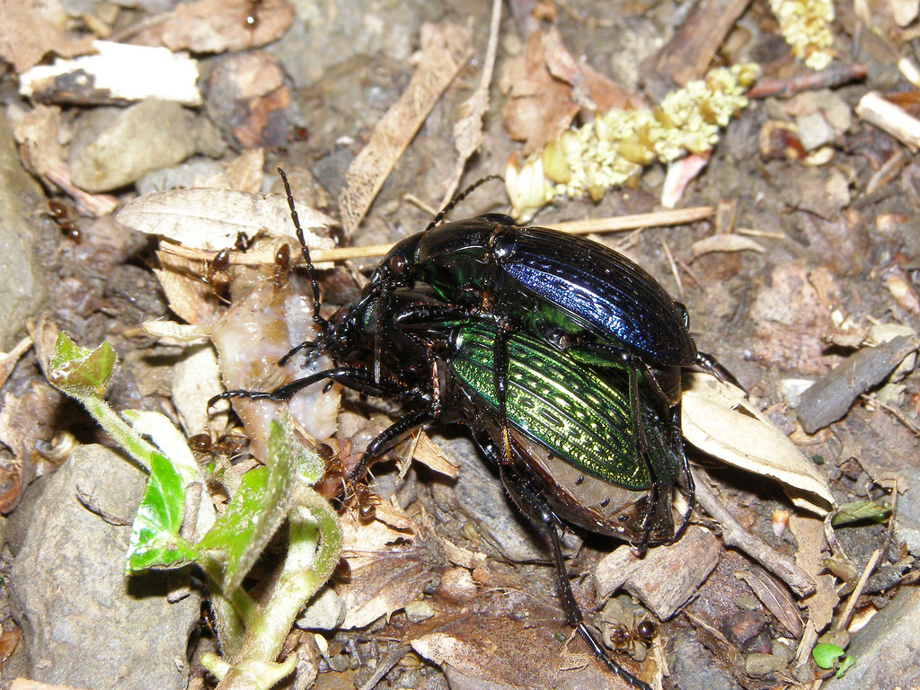 Rezes futrinka párzás